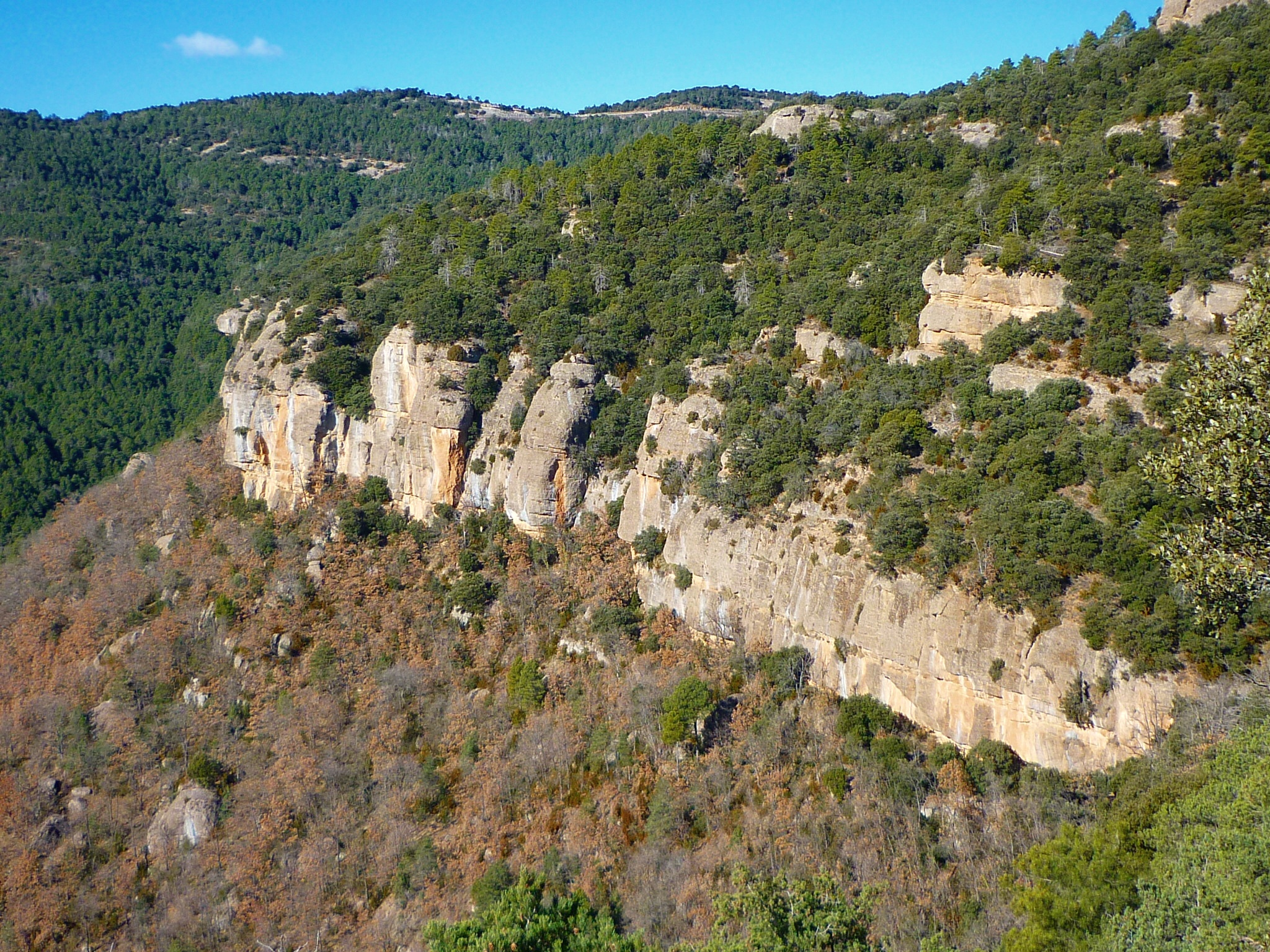 Cingles de la Segarra, a la capçalera de la rasa de la Salada Vella, des de l'ermita de Sant Jaume, a l'est del terme de Lladurs (Solsonès -Catalunya)